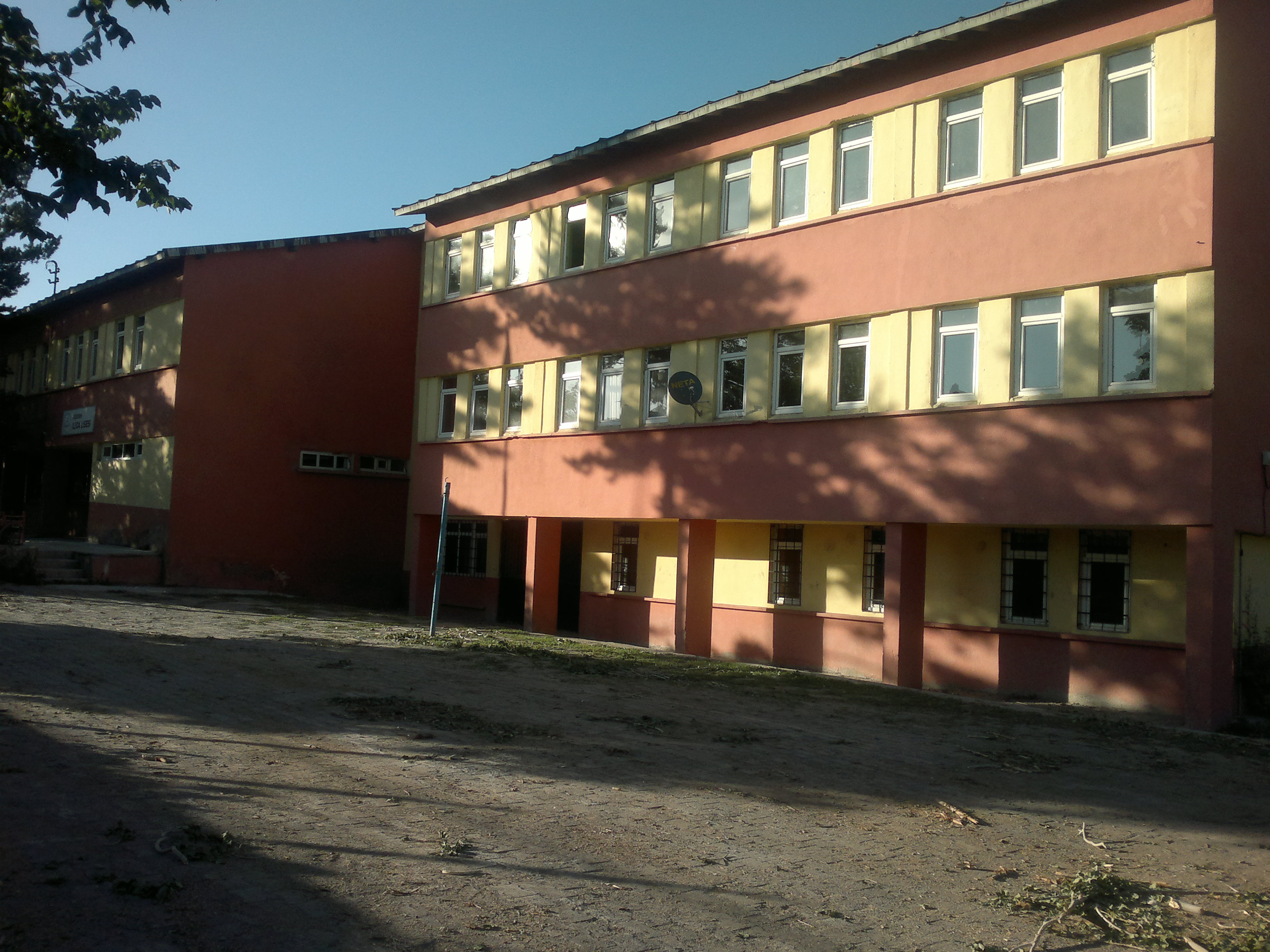 Erzurum Ilıca Lisesi